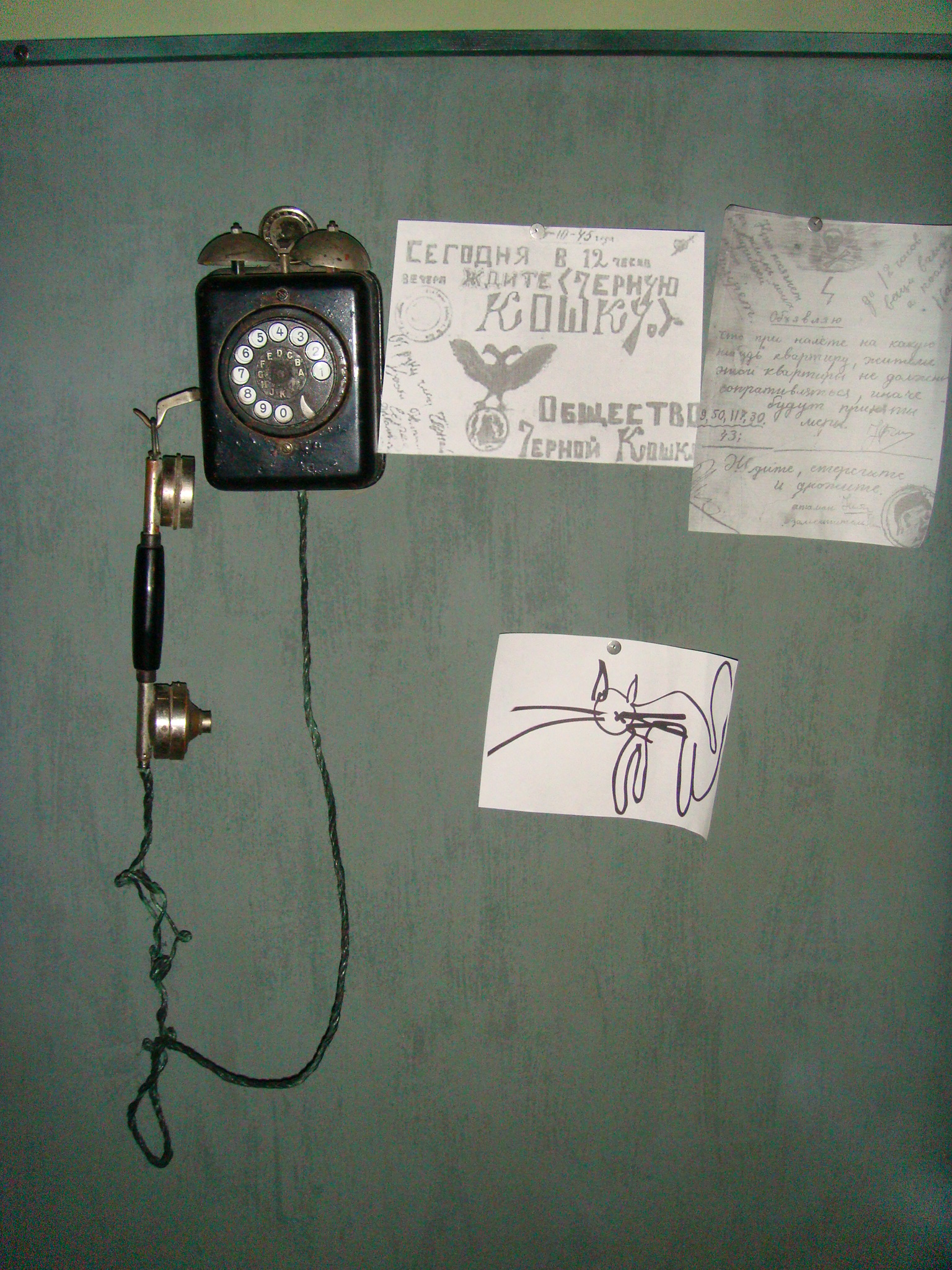 Одесский музей кино, съёмочный павильон № 5, аттрибутика съёмок "Место встречи изменить нельзя"